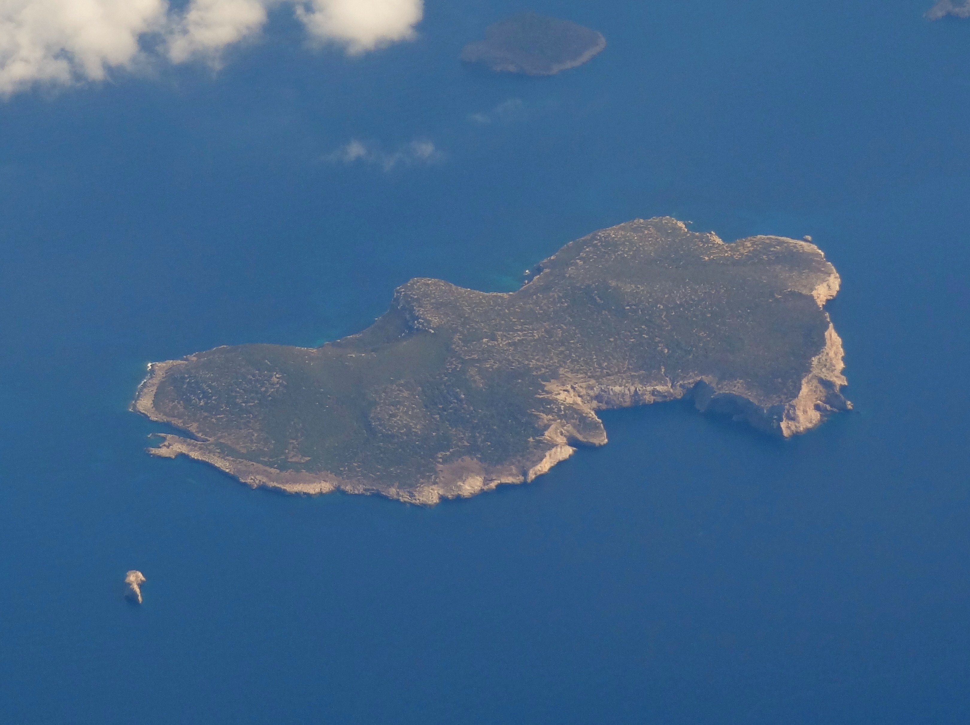 Illa des Conills und Felsen l’Esponja, im Hintergrund Illa Redona, nördlich von Cabrera, südlich Mallorca, Spanien